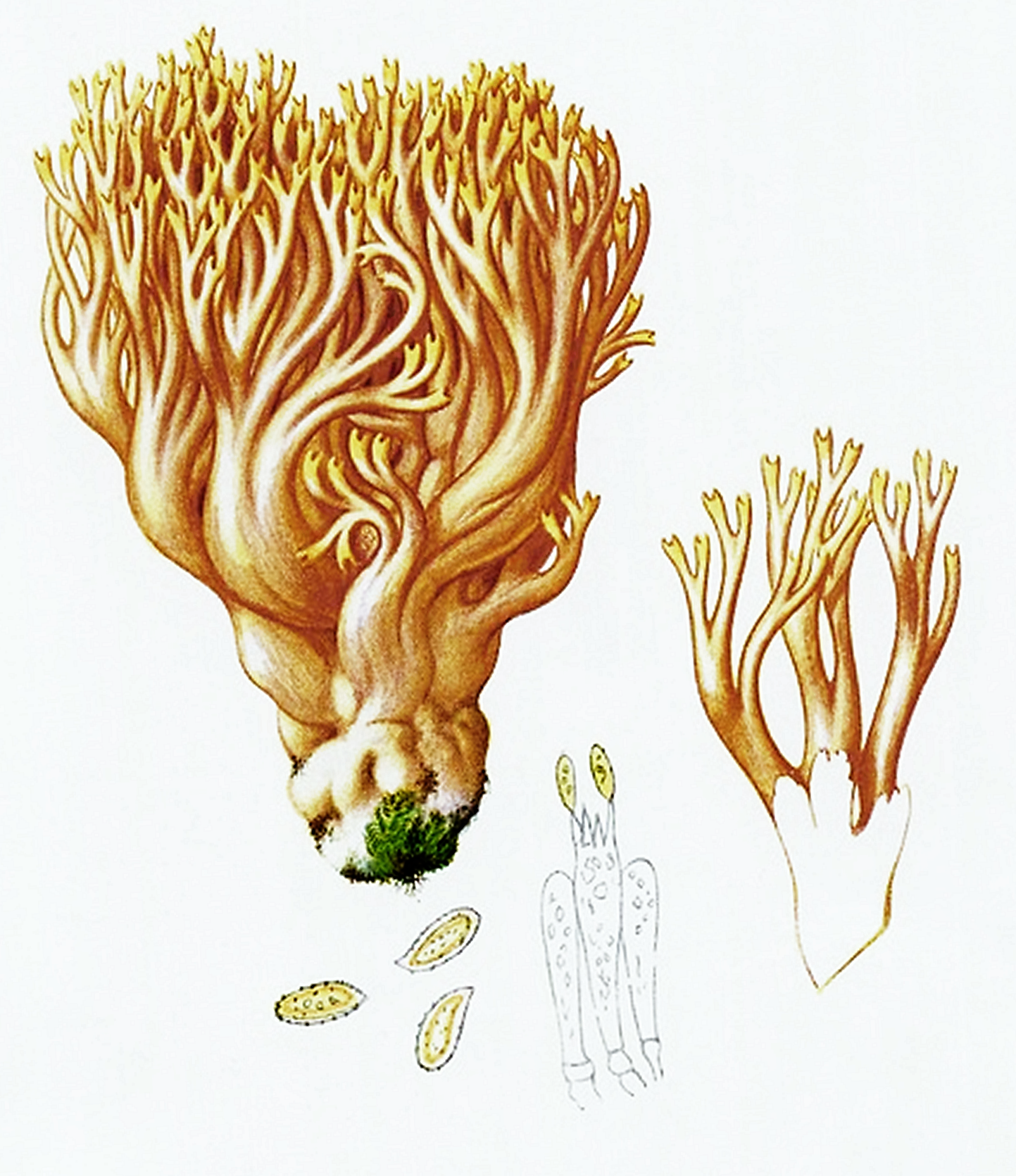 Giacomo Bresadola: Clavaria formosa Pers.